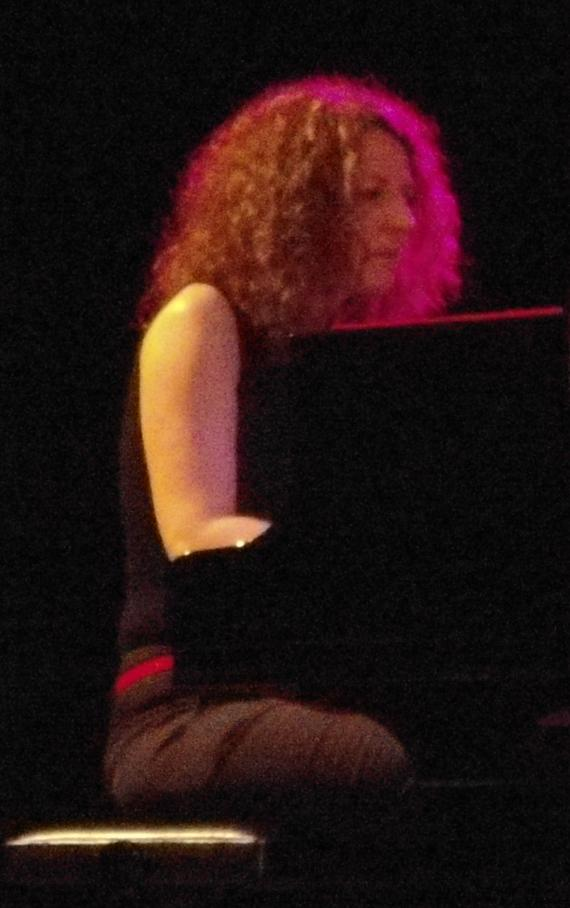 Béatrice Kahl beim Jazzfestival St. Ingbert 2013